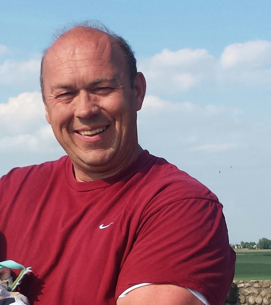 Wout Zijlstra met een baby